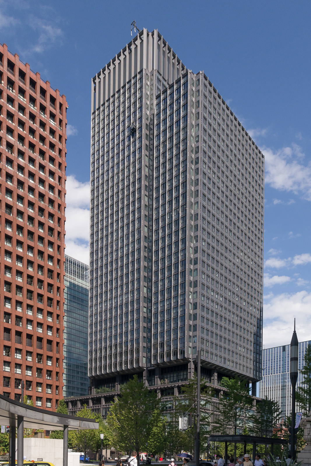 新丸の内ビルディング、東京都千代田区丸の内1丁目。